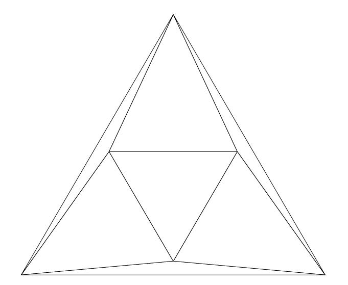 Schlegelbild eines Oktaeders